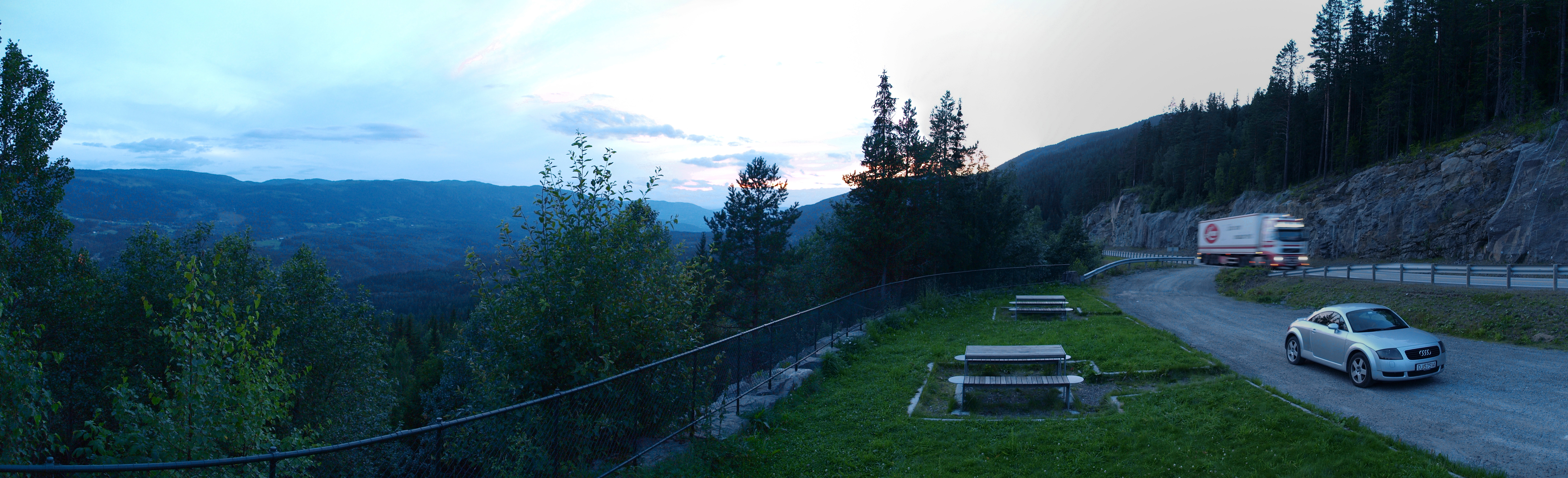 Riksvei 33 på Tonsåsen i Oppland, Norge. Panorama nord-vest-sør inn mot sentrale deler av Valdres.